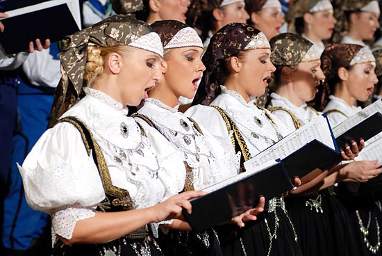 Wielka msza żałobna Francois Joseph Gosseca w wykonaniu Zespołu Pieśni i Tańca Śląsk w Mikołowie